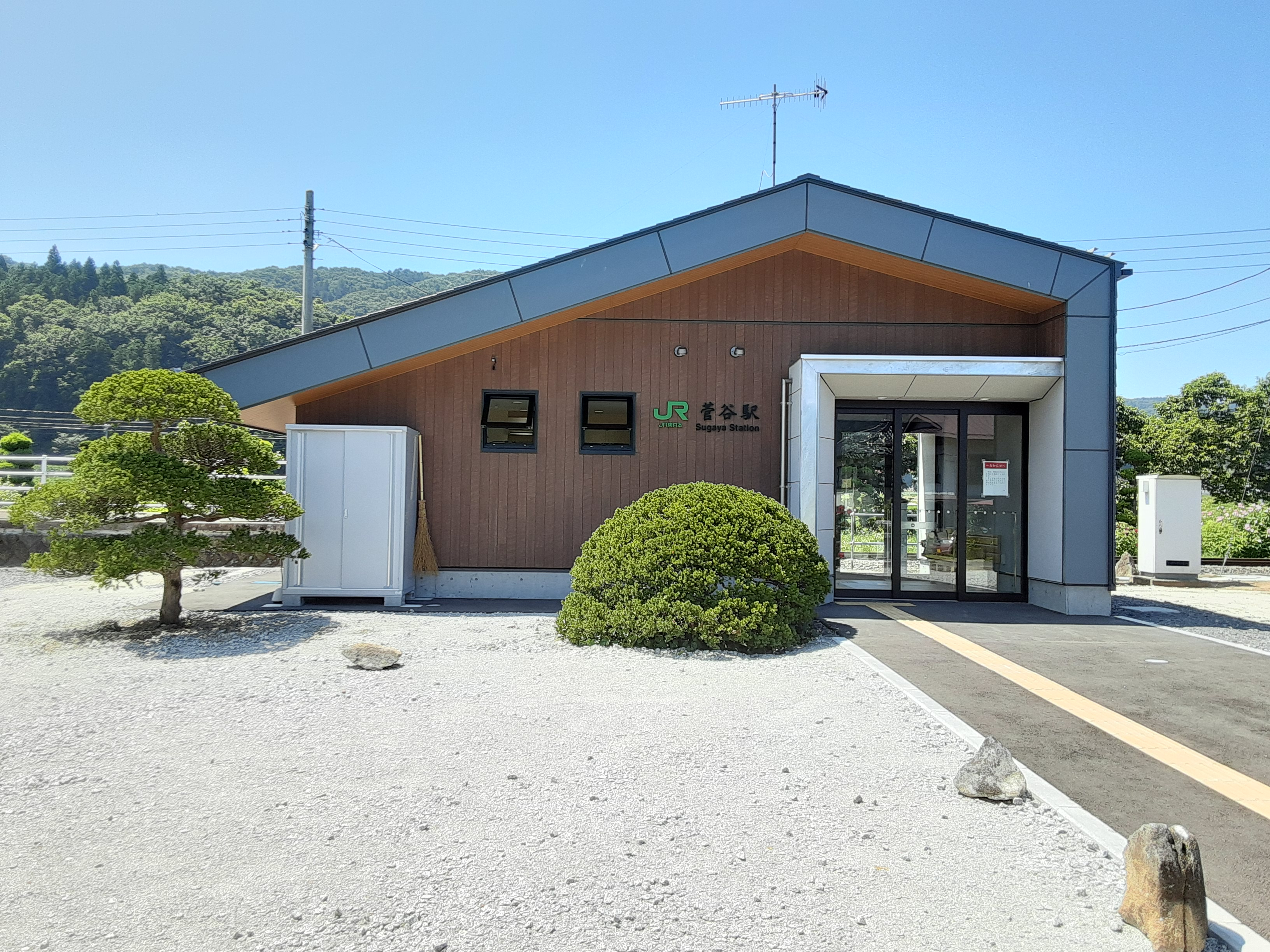 菅谷駅駅舎